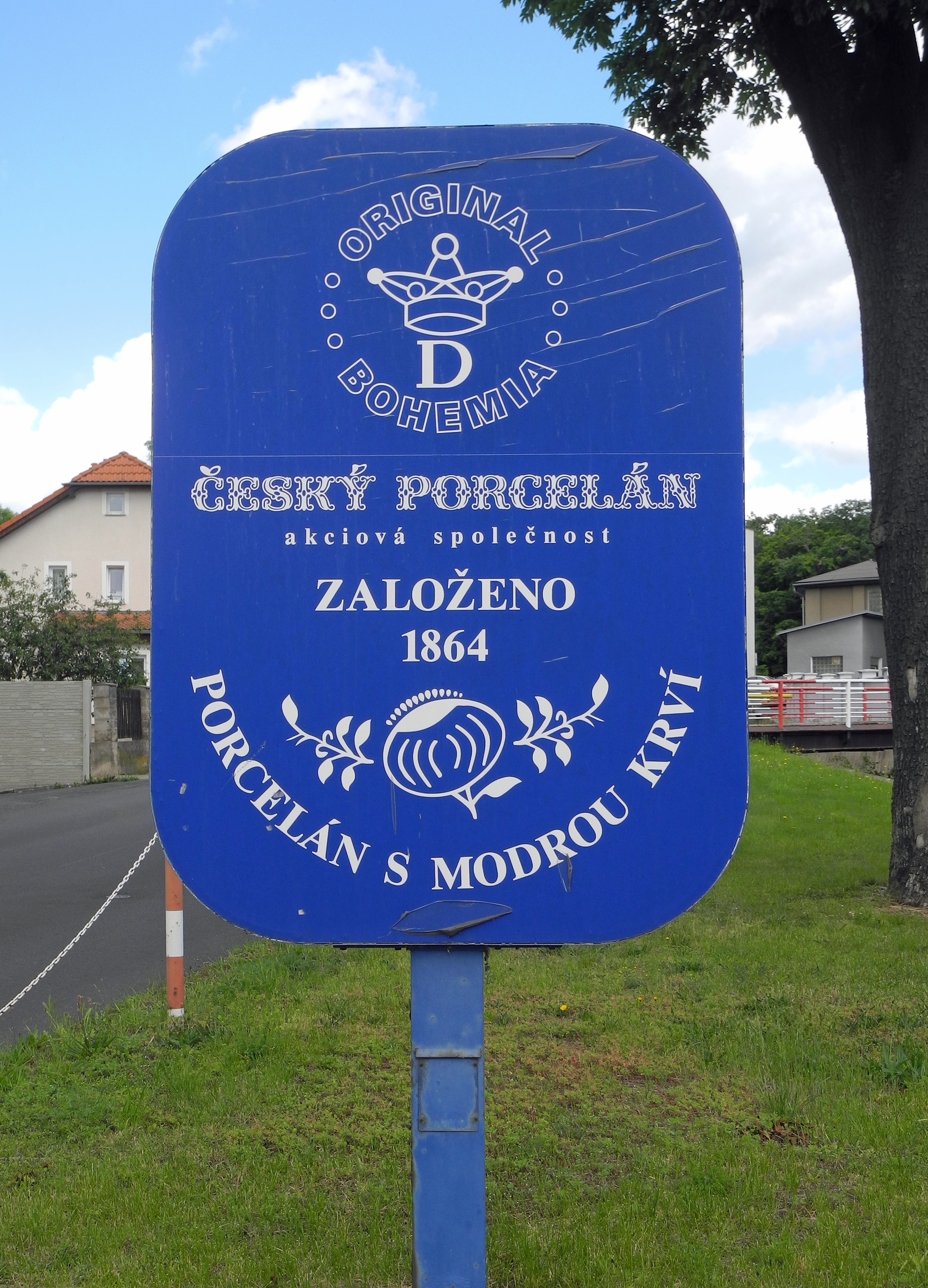 Porzellanfabrik Český porcelán, a.s. in Eichwald – Dubí u Teplic, Tovární 605/17